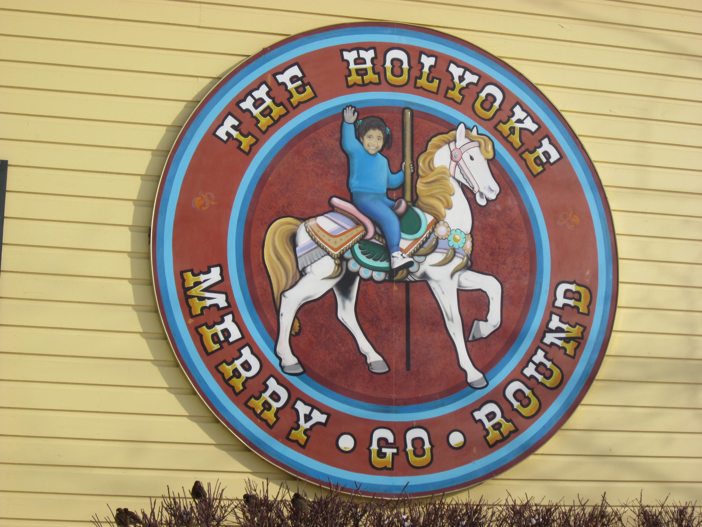 Holyoke, Massachusetts